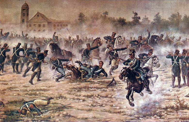 Combate de San Lorenzo, detalle de la carga de Granaderos a Caballo